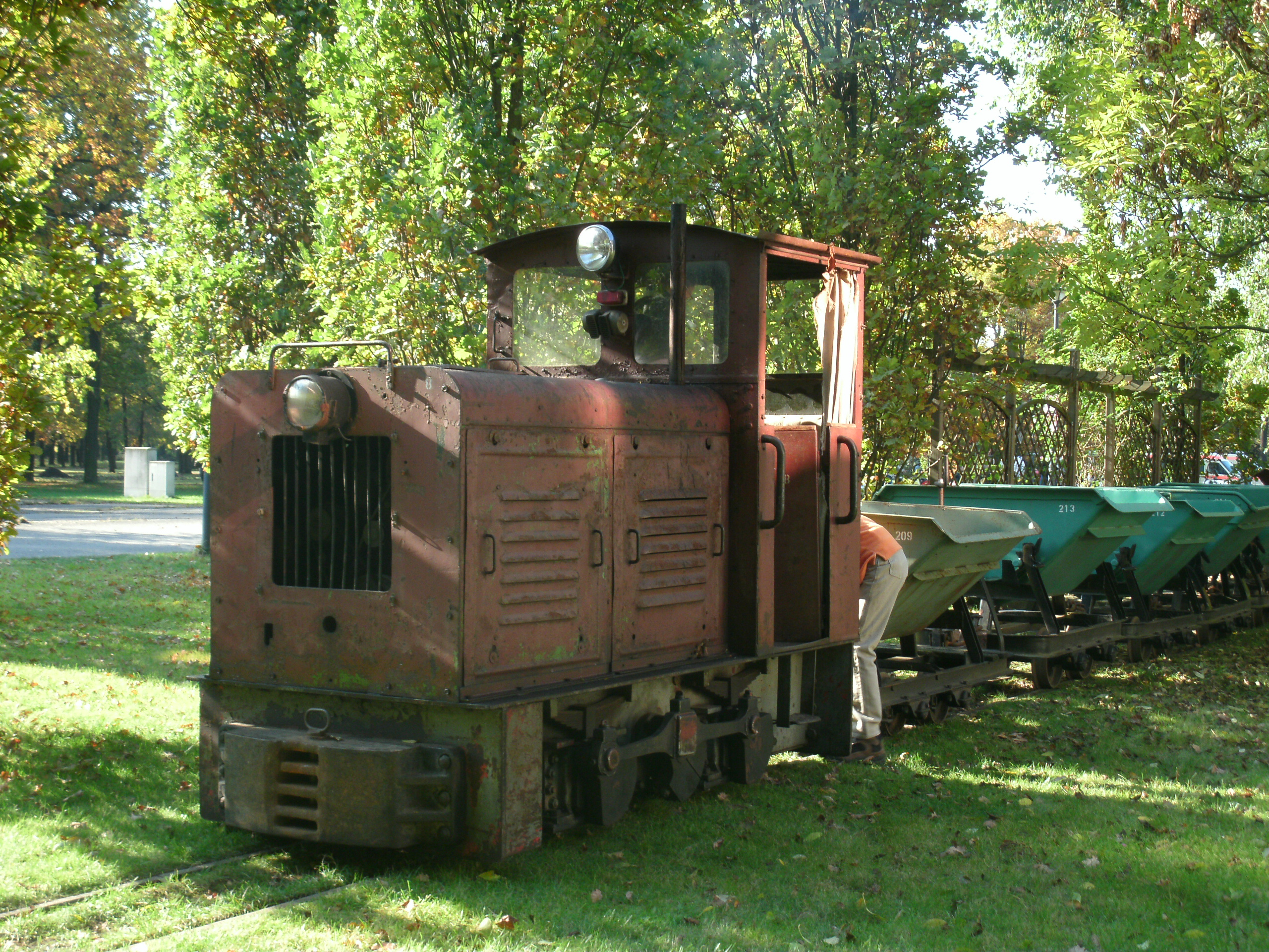 Feldbahndiesellok Ns2f, Baujahr: 1954, Hersteller: LKM Babelsberg, eingesetzt beim 500mm Feldbahnprojekt im FEZ Wuhlheide, hier im Bahnhof Palast